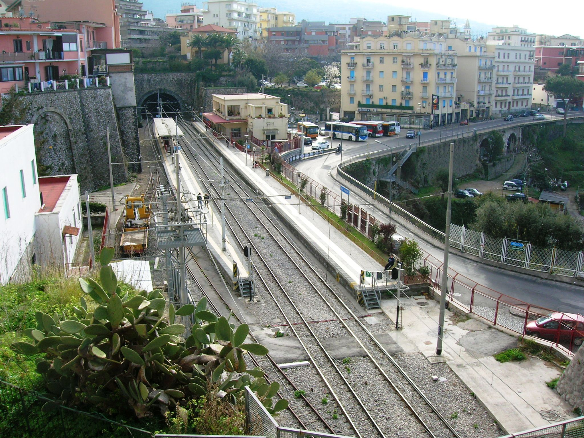 La stazione di Vico Equense visto dall'alto